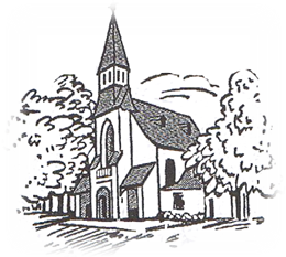 Logo Kath. Wallfahrtskapelle Maria Hilf Beselich bei Obertiefenbach